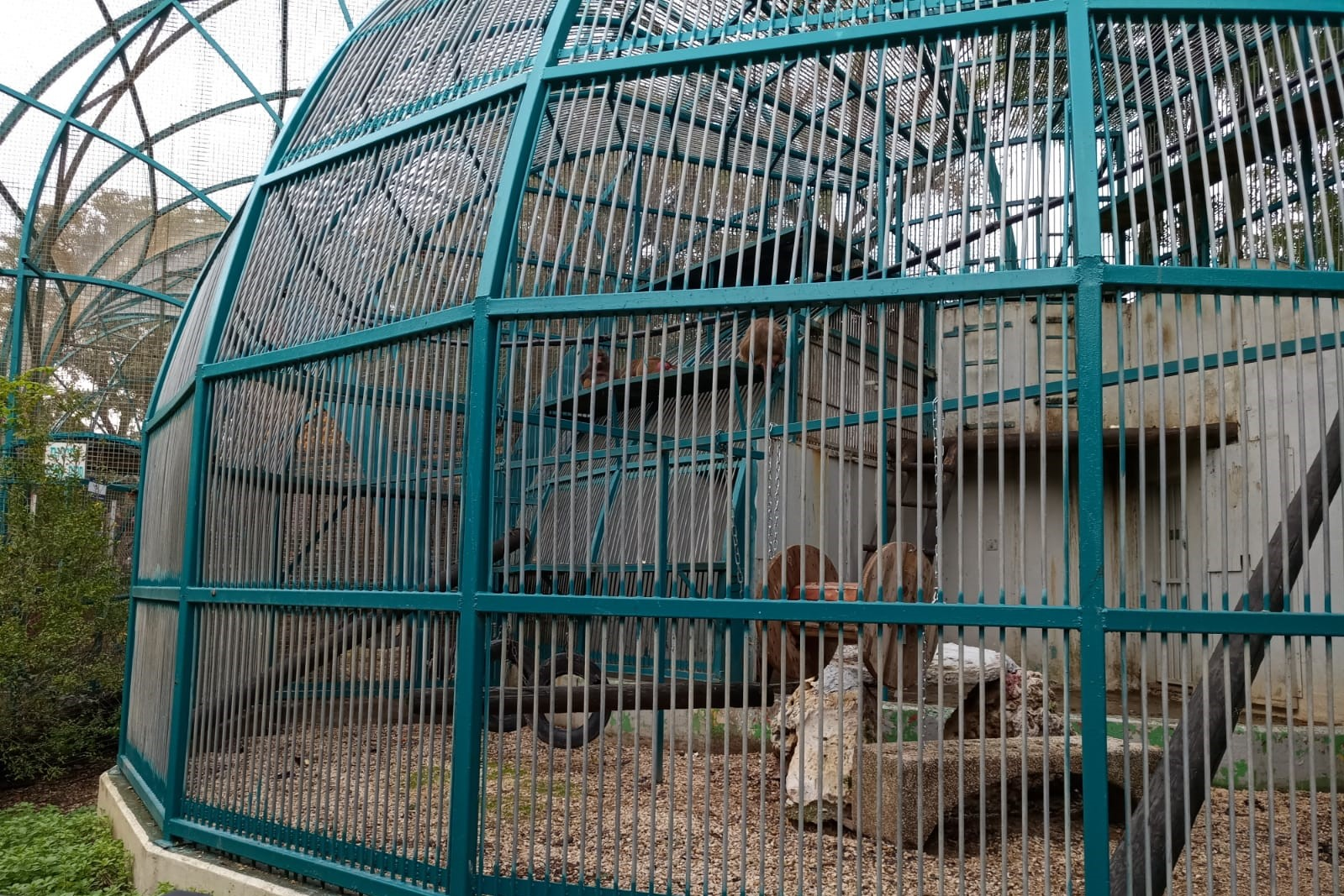 גן החי